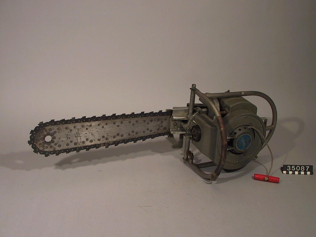 Motorsåg av fabrikat "Comet", modell B. Gråmålad kåpa och motorhus av gjuten lättmetall, med handtag och båge av stålrör. Glödstiftsmotor. Tillbehör: Förvaringslådan innhåller följande reservdelar och tillbehör: 3 startsnören med röda handtag, 1 påfyllningstratt med rensnät, 1 plåtask med skruv, packningar, m.m., 1 reservtank, 1 påse med extratänder till kedjan samt 1 mässingssil för smörjning.